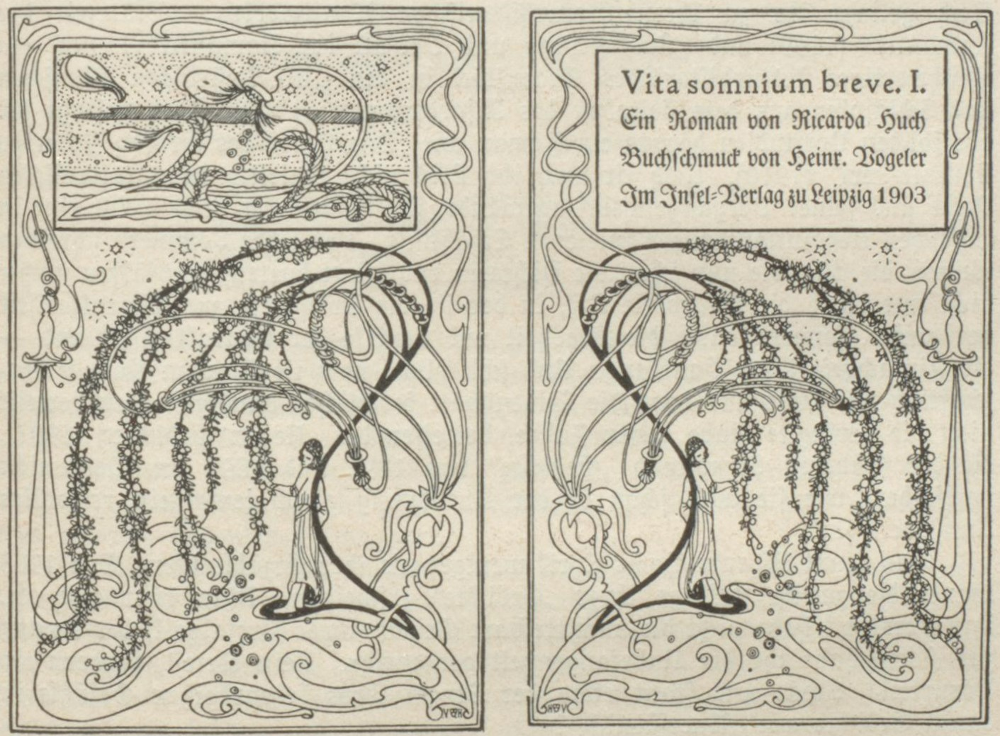 Heinrich Vogeler Ricarda Huch Vita somnium breve Leipzig : Insel-Verlag, 1903